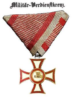 Croce al merito militare austriaca Militär-Verdienstkreuz